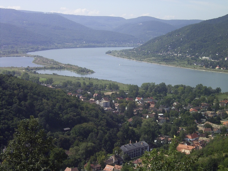 Das Donauknie bei Visegrád 2004 Autor: Denis Barthel 01:27, 9. Sep 2004 Denisoliver 800 x 600 (207221 Byte) (Das Donauknie bei Visegrád Autor: Denis Barthel Lizenz: GNU-FDL)